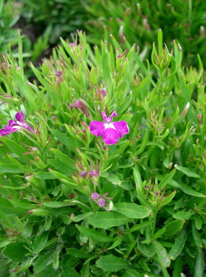 Lobelia erinus 'Riviela Rose'